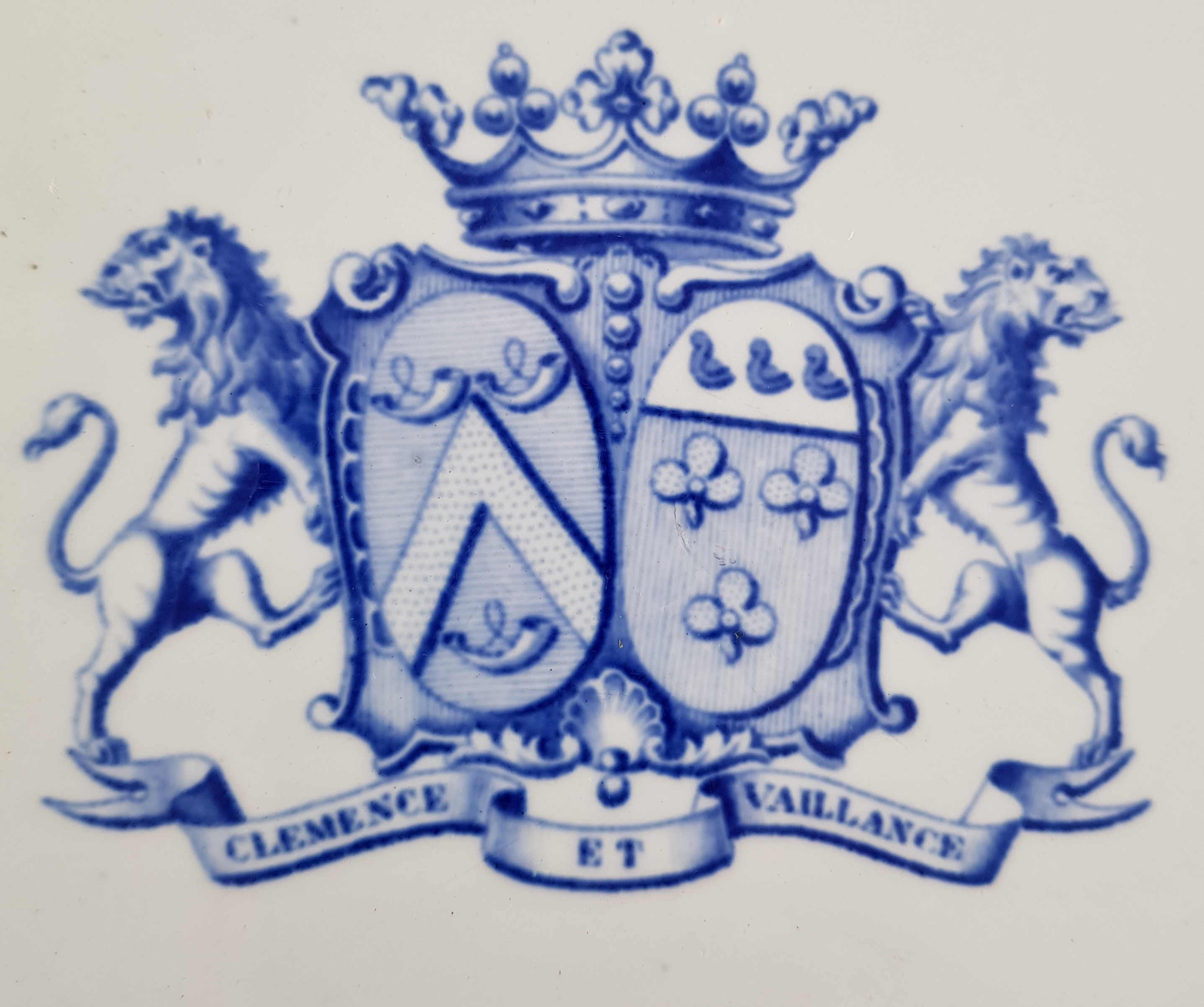 Blason de gauche : Saguez de Breuvery